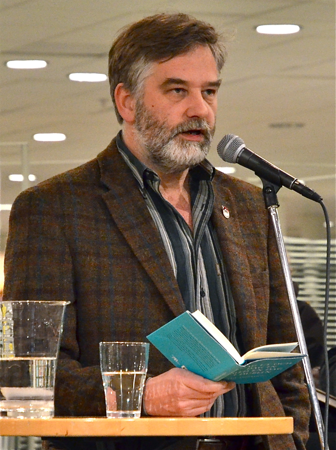 Erik Andersson på Akademibokhandeln City/Stockholm 10 mars 2012.